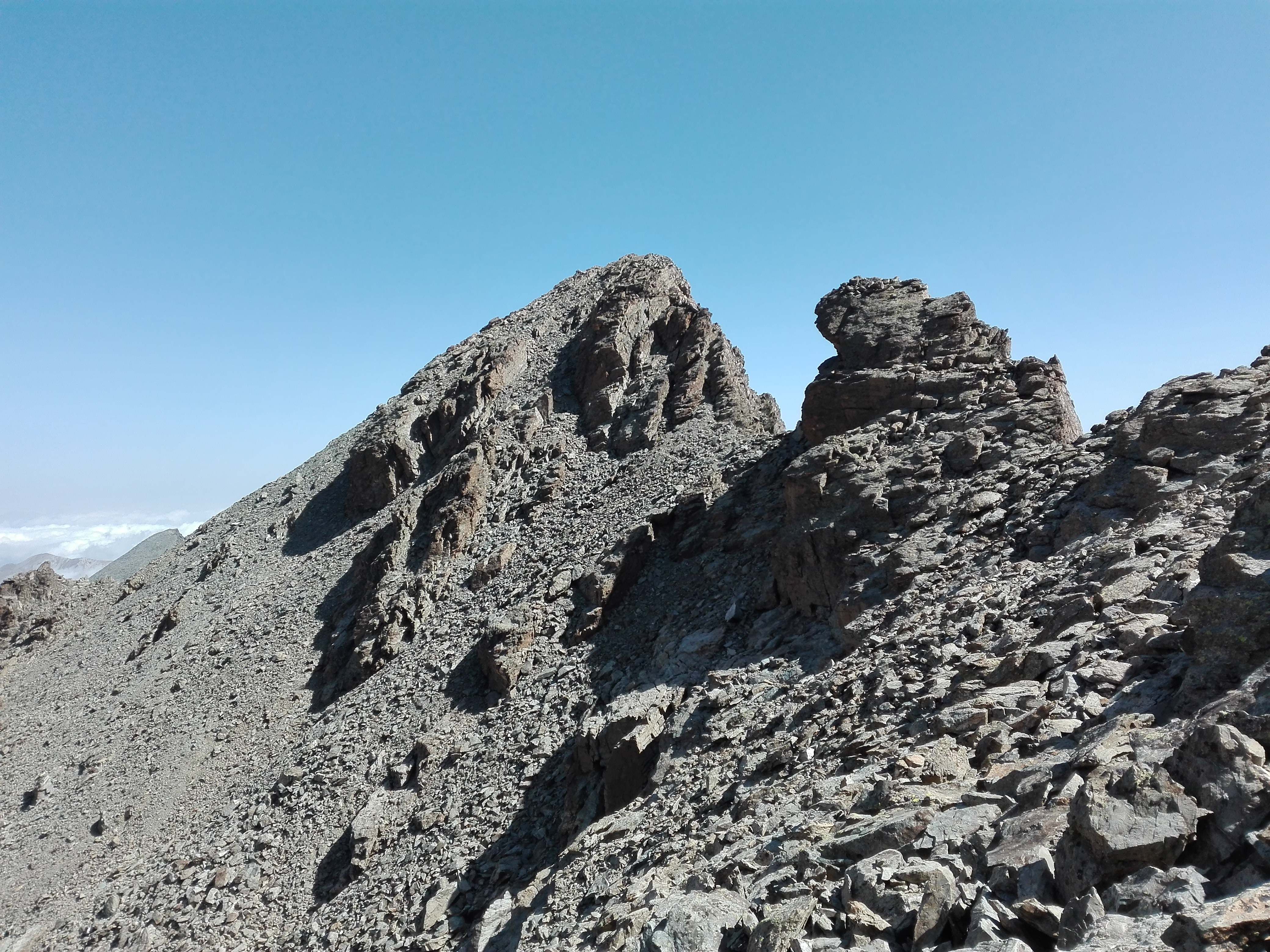 La punta Michelis vista dal colletto Dante.